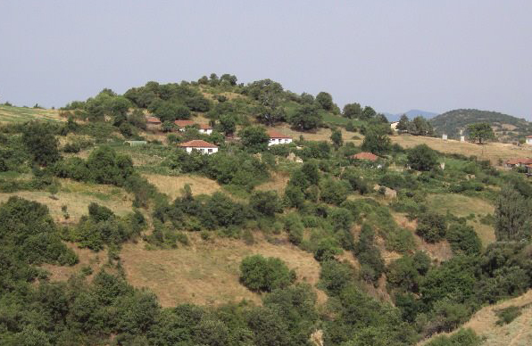 Dorlombos, Macedonia